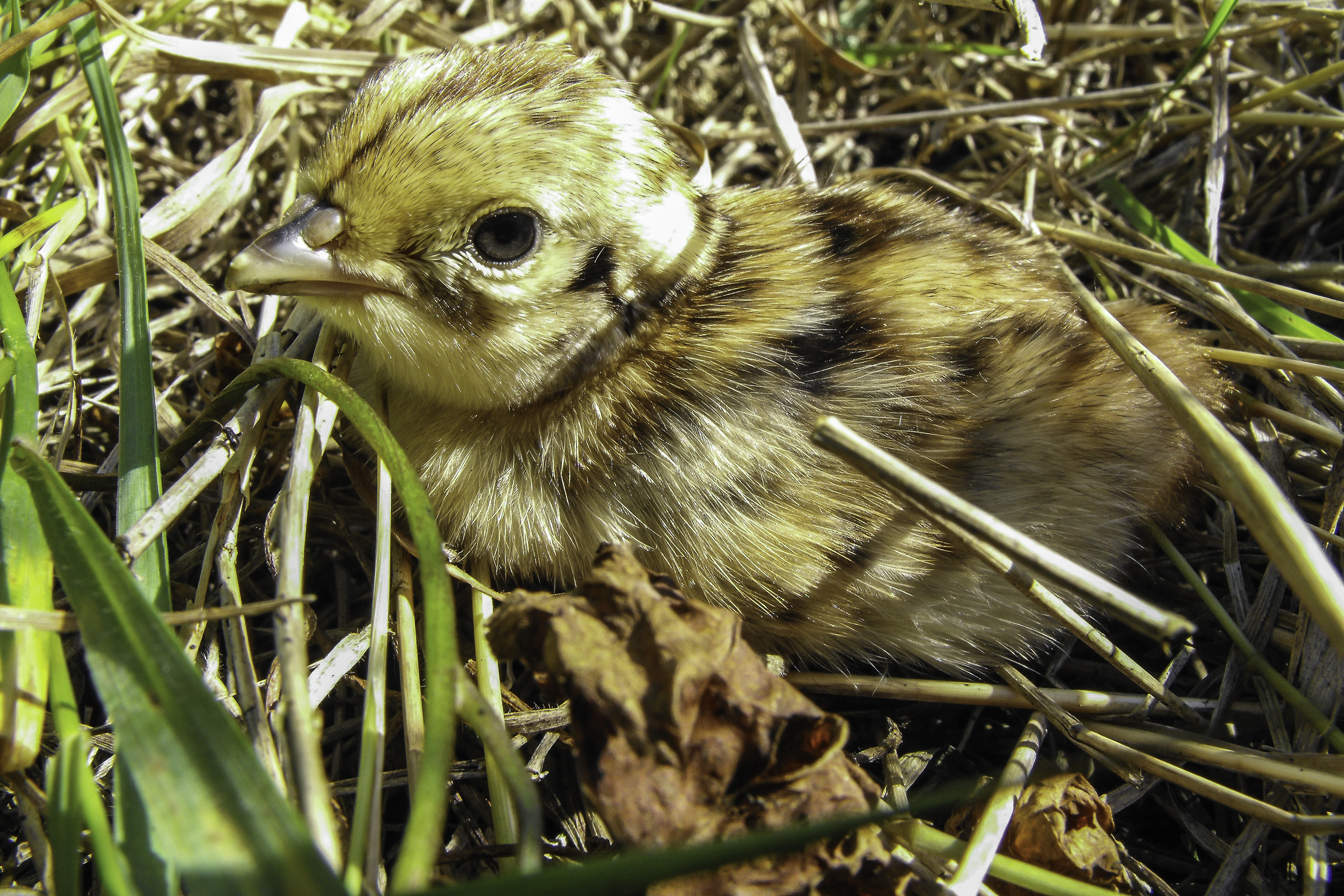 Fácáncsibe (Marosvásárhely)